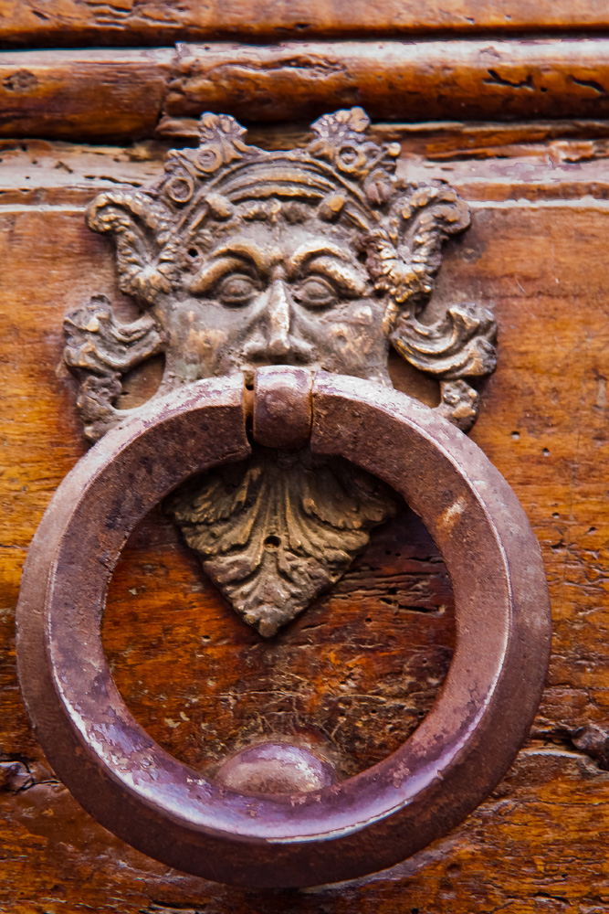 Uno dei numerosi antichi battenti presenti nelle porte del centro storico di Terni (1500 circa)